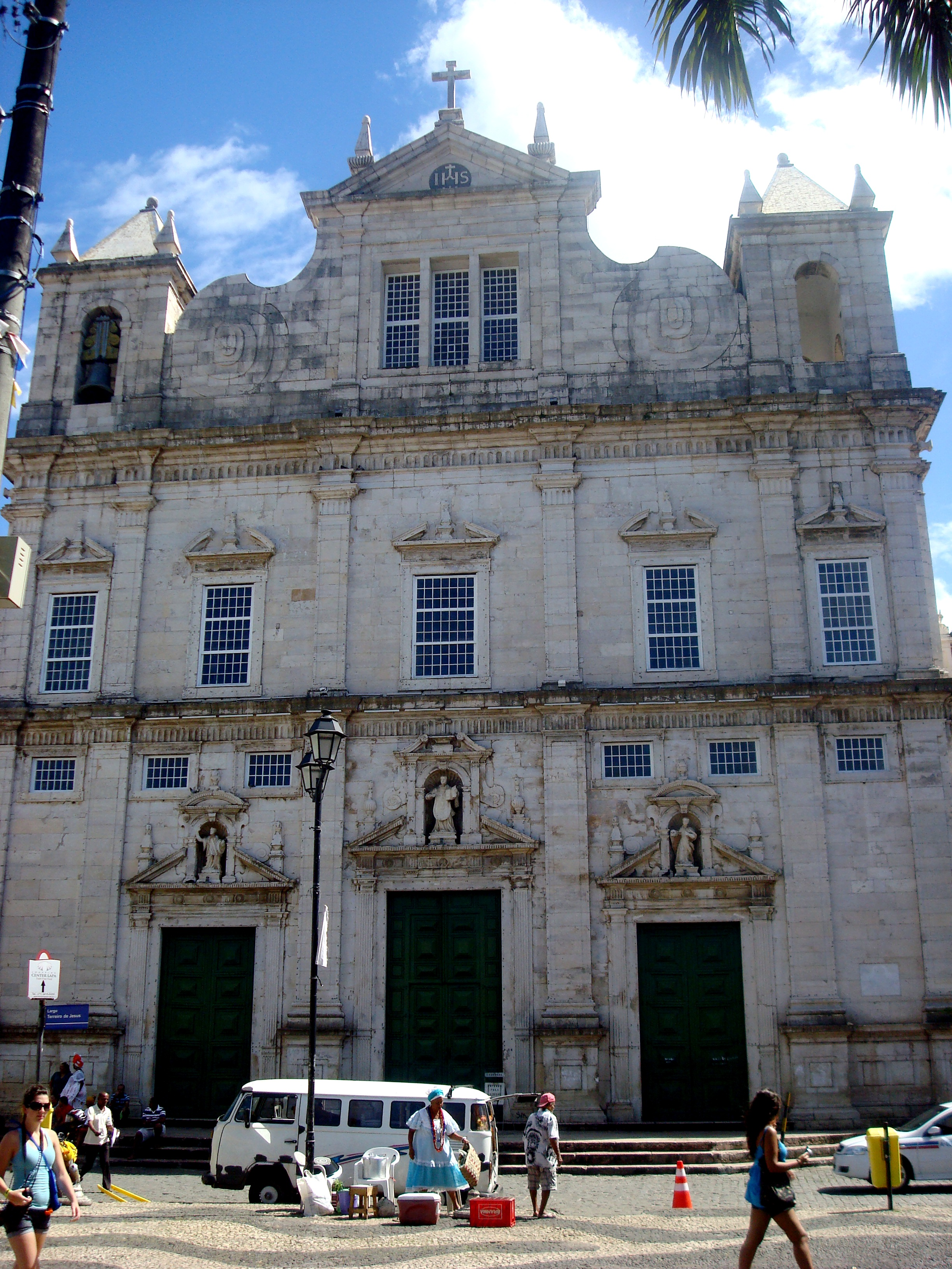 Catedral Basílica de Salvador